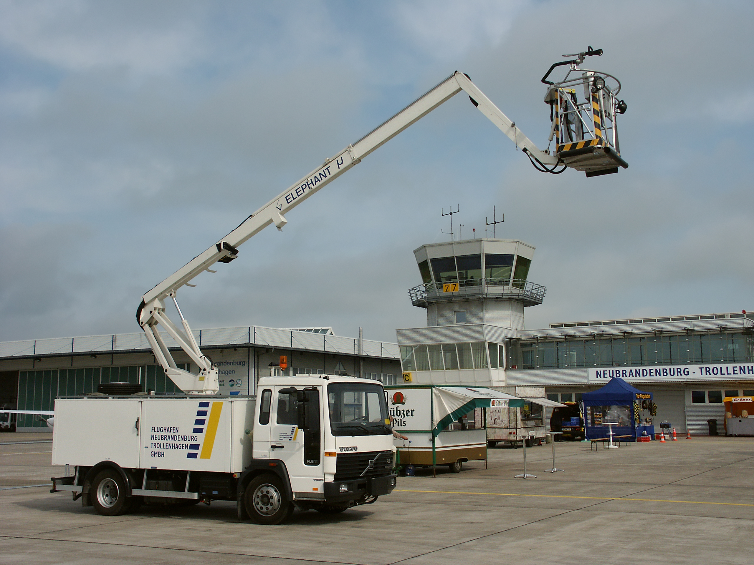 Volvo FL I